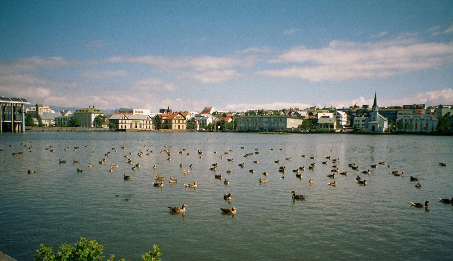 Tjörnin, Reykjavík, Iceland